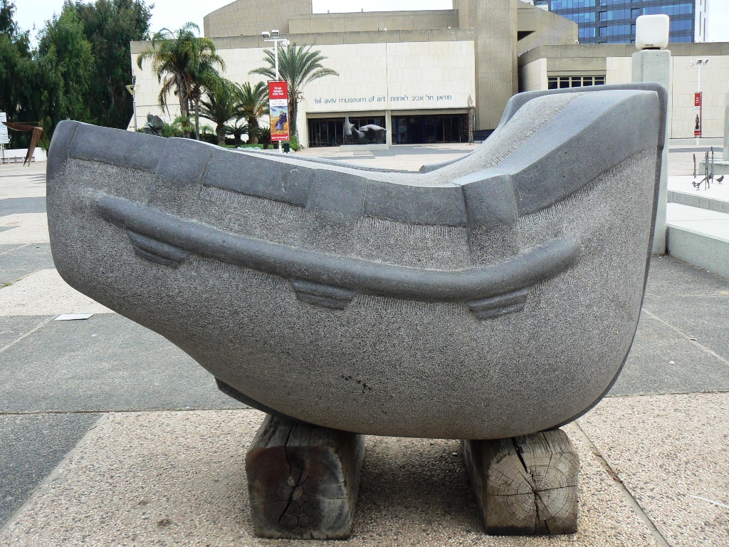 פסל הסירה של עמנואל הצופה מוצג ברחבת מוזיאון תל אביב לאמנות